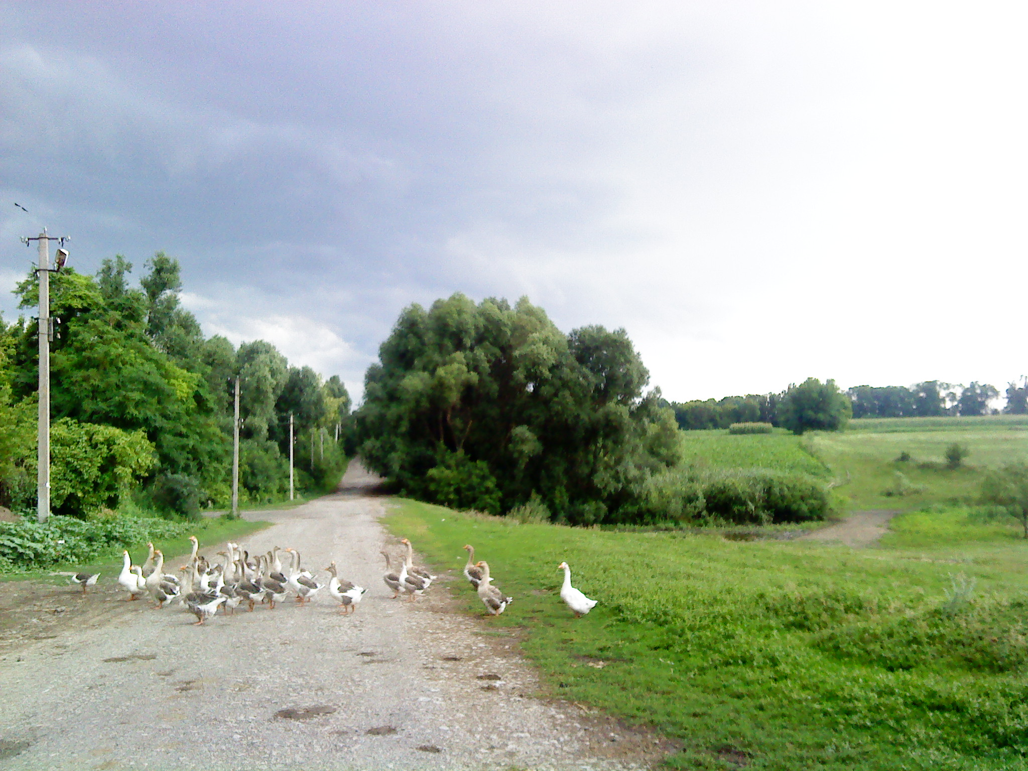 Гуси йдуть через вигін в с. Першотравневому (Сумщина)